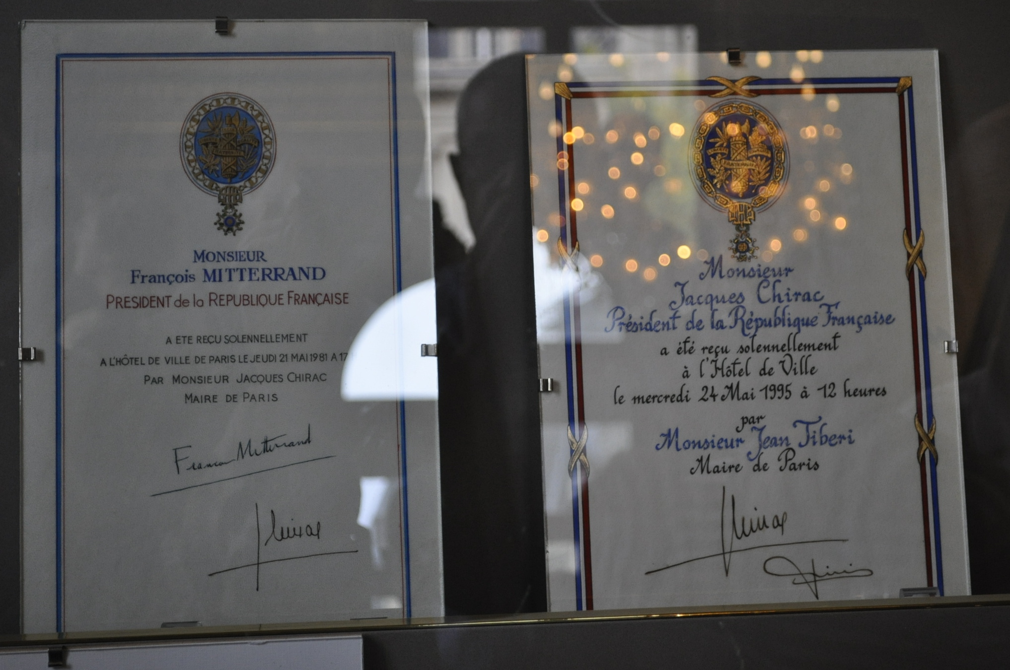 Livres d'or des visites du président de la République à l'hôtel de ville de Paris lors de son investiture. - François Mitterrand, reçu par Jacques Chirac le 21 mai 1981 - Jacques Chirac, reçu par Jean Tibéri le 24 mai 1995